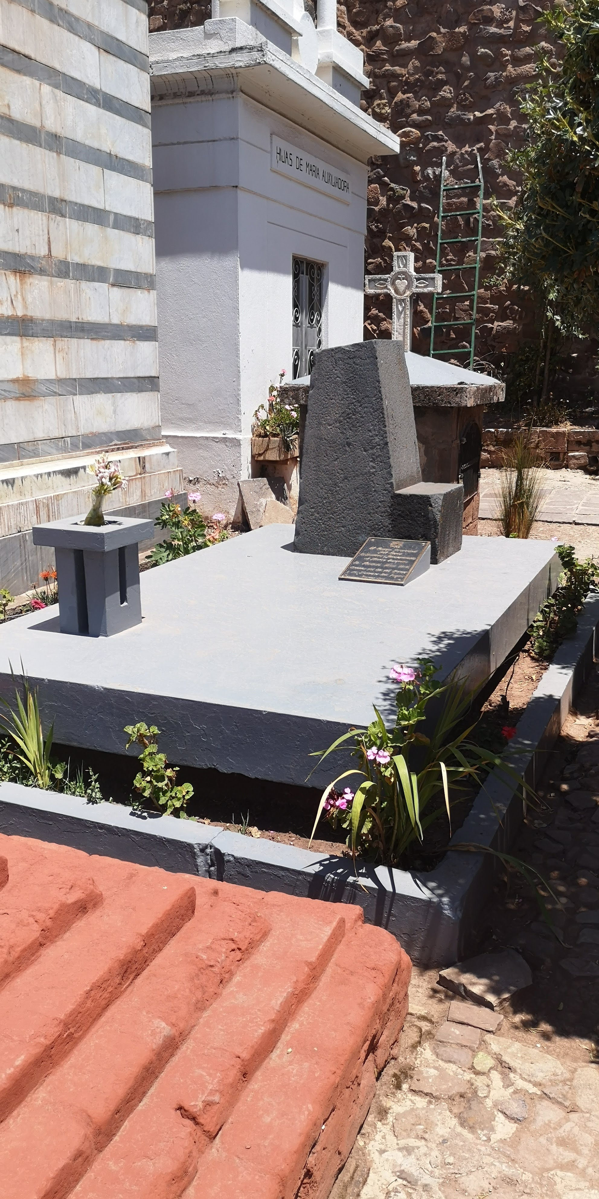 Mauselo de Humberto Vidal Unda en Cusco, Perú